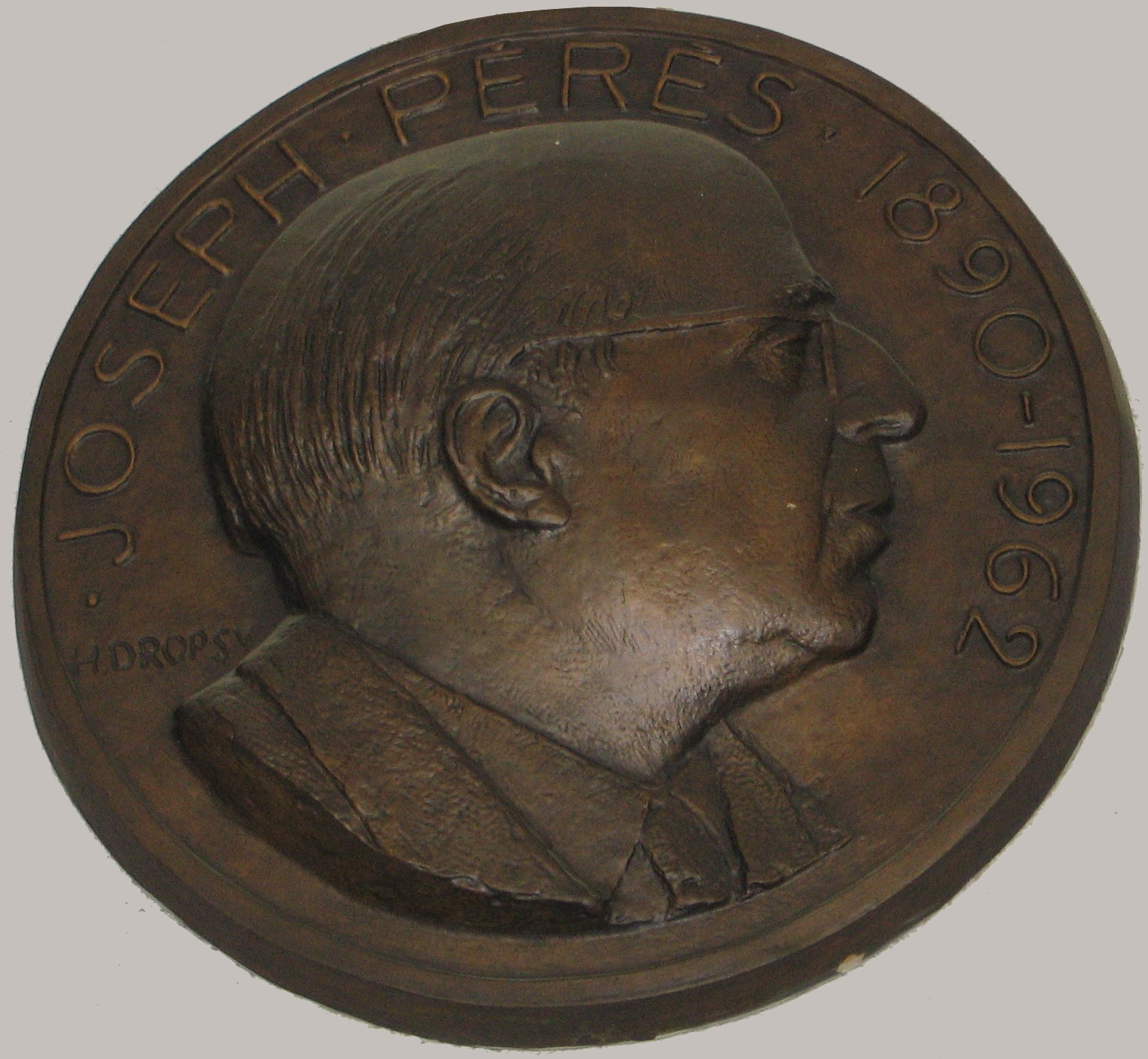 Médaillon de Joseph Pérès, par Henri_Dropsy à l'entrée de l'amphithéâtre Pèrès. Université de Provence Site Saint-Charles 3 place Victor-Hugo 13003 Marseille.